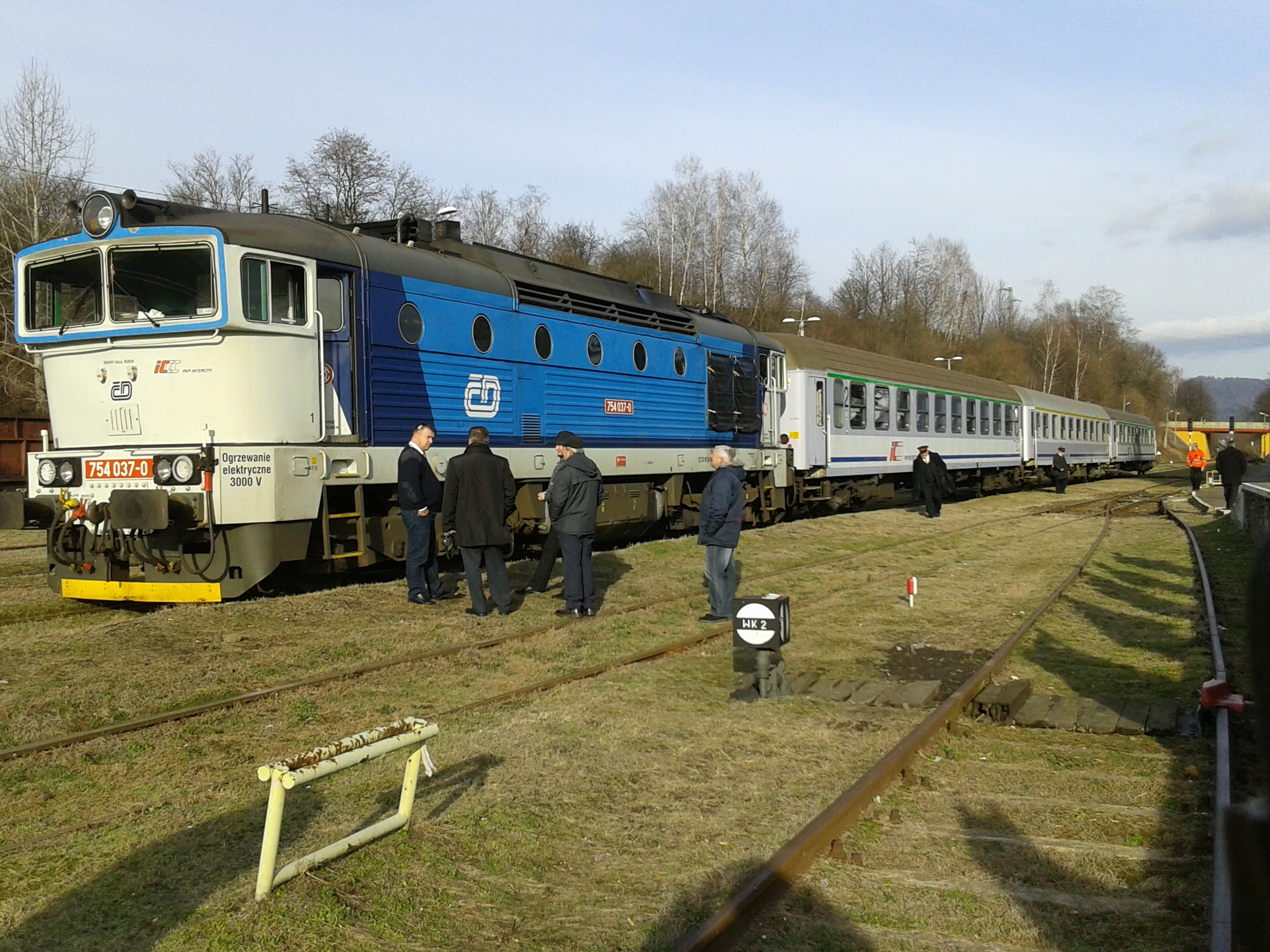 Pierwszy pociąg IC-TLK "Monciak" relacji Gdynia Główna - Zagórz po wjeździe do stacji w Zagórzu.